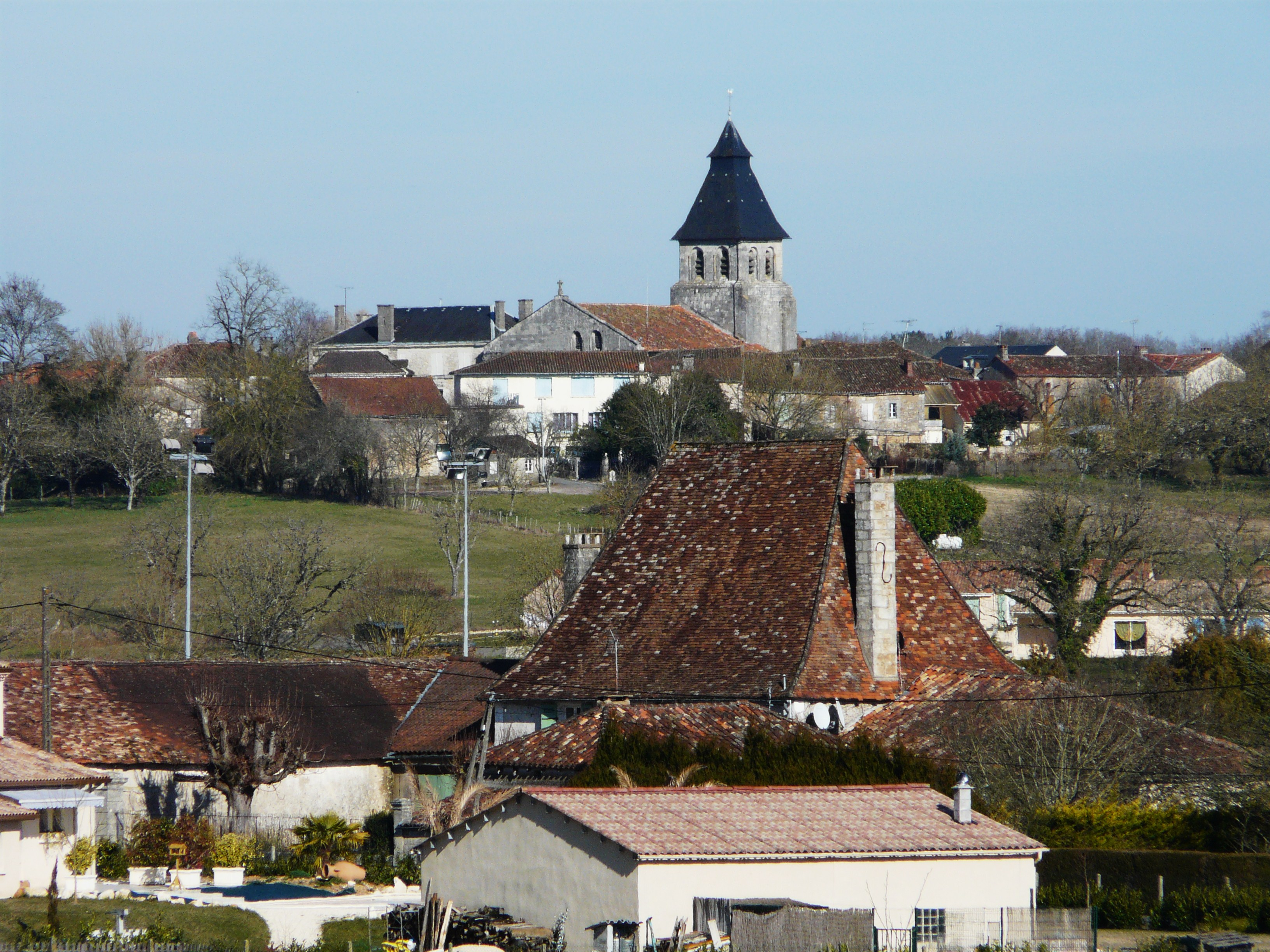 Le bourg de Sorges, Dordogne, France